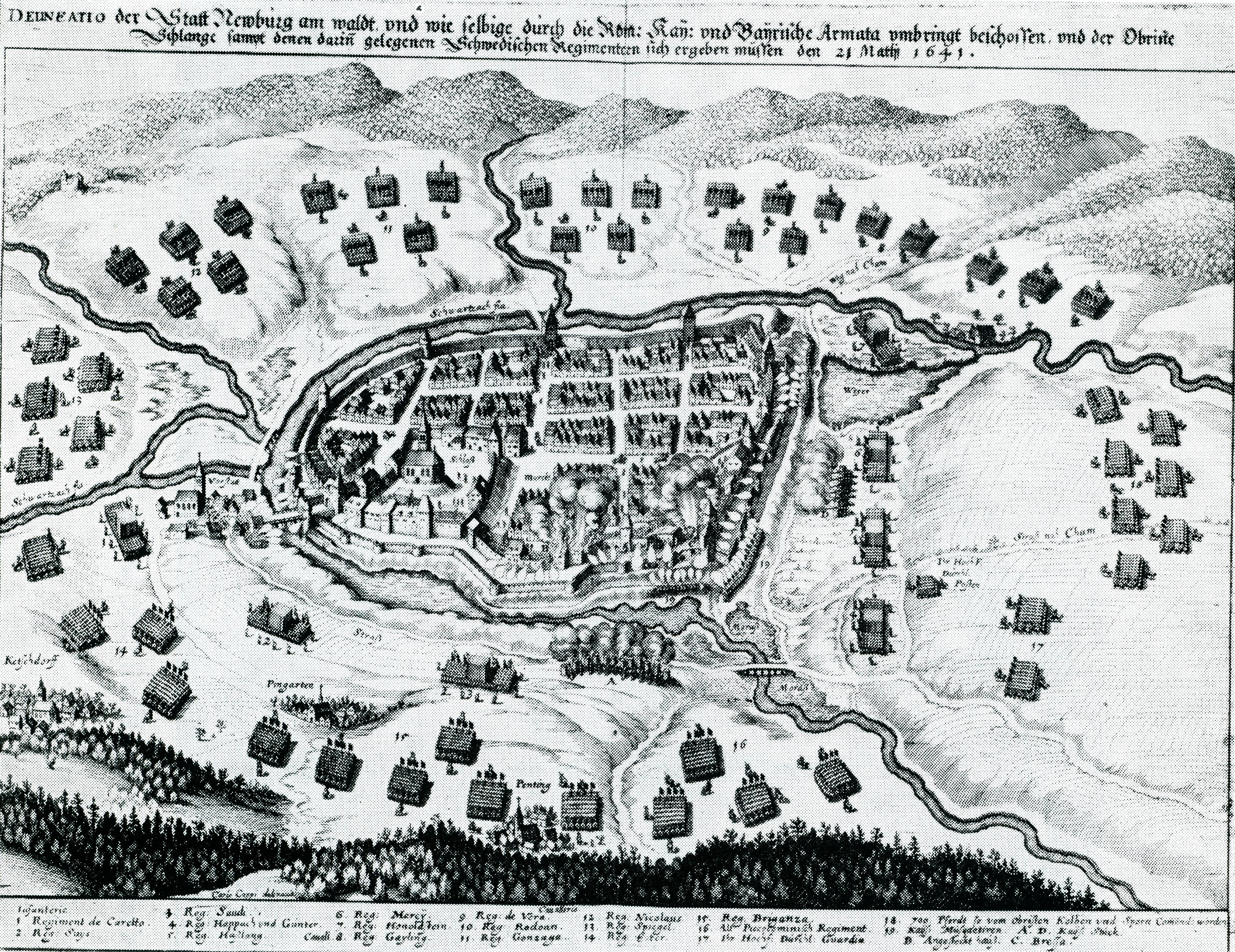 Belagerung von Neunburg vorm Wald (1644)